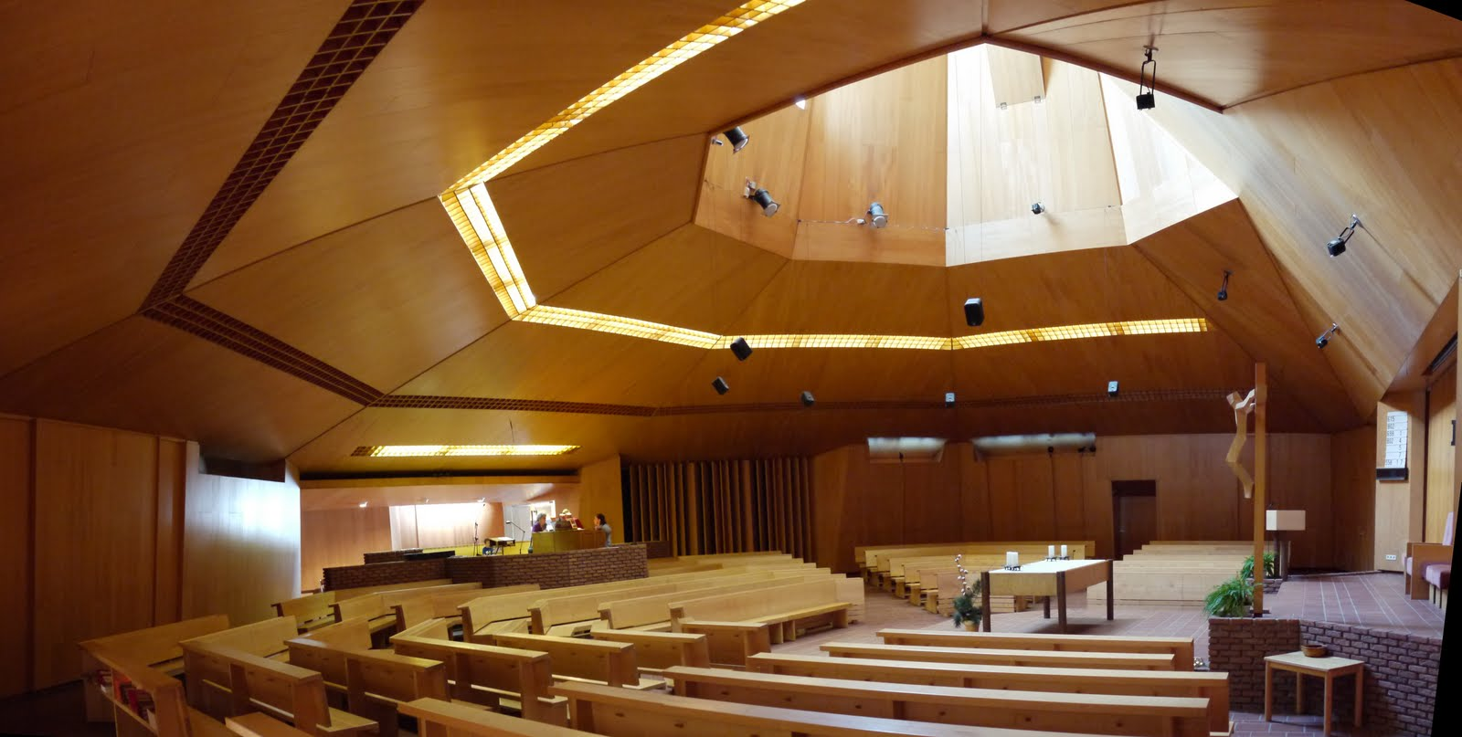 Wohnparkkirche Alt-Erlaa innen